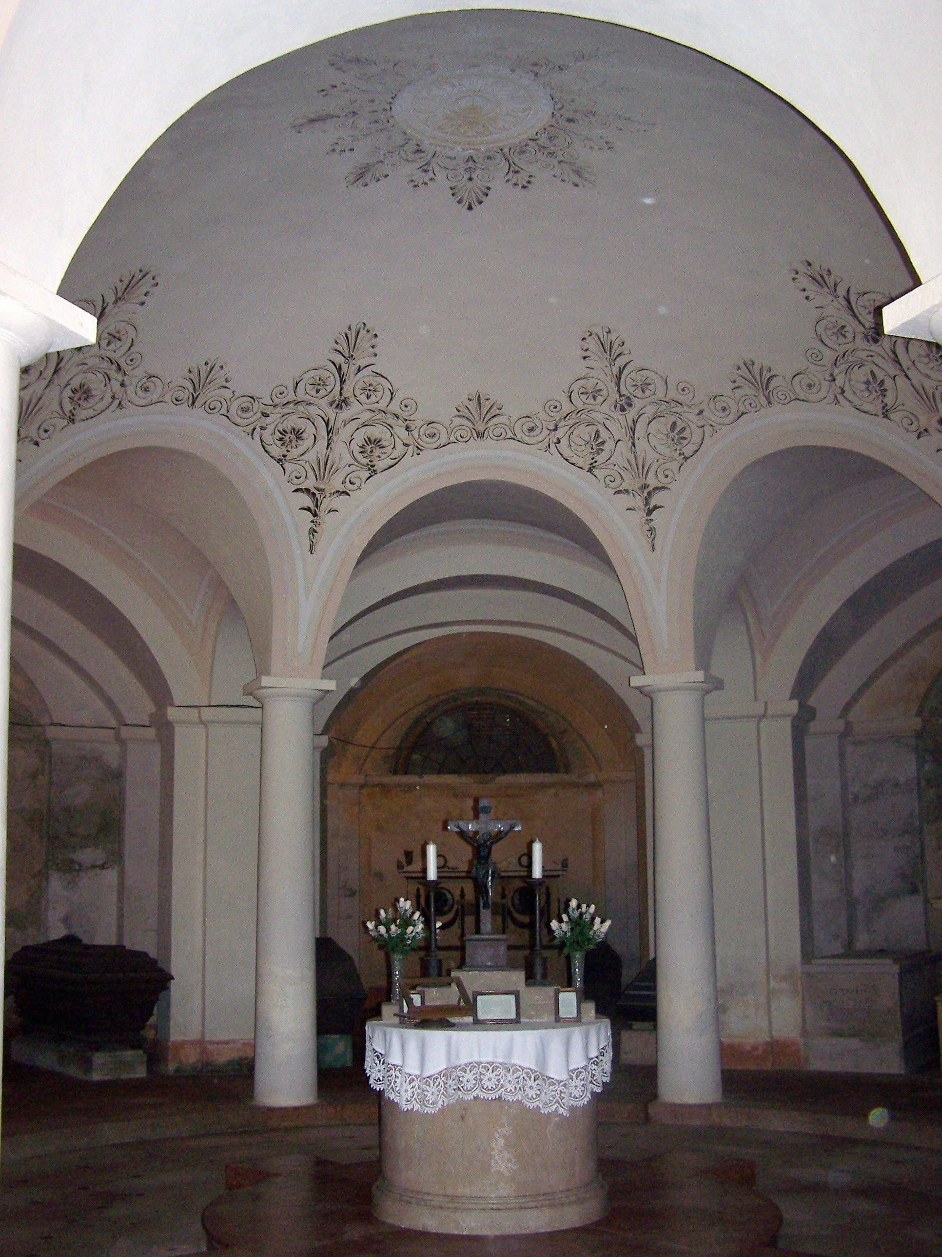 R. k. templom (Ganna, Fő utca) This is a photo of a monument in Hungary. Identifier: 9873